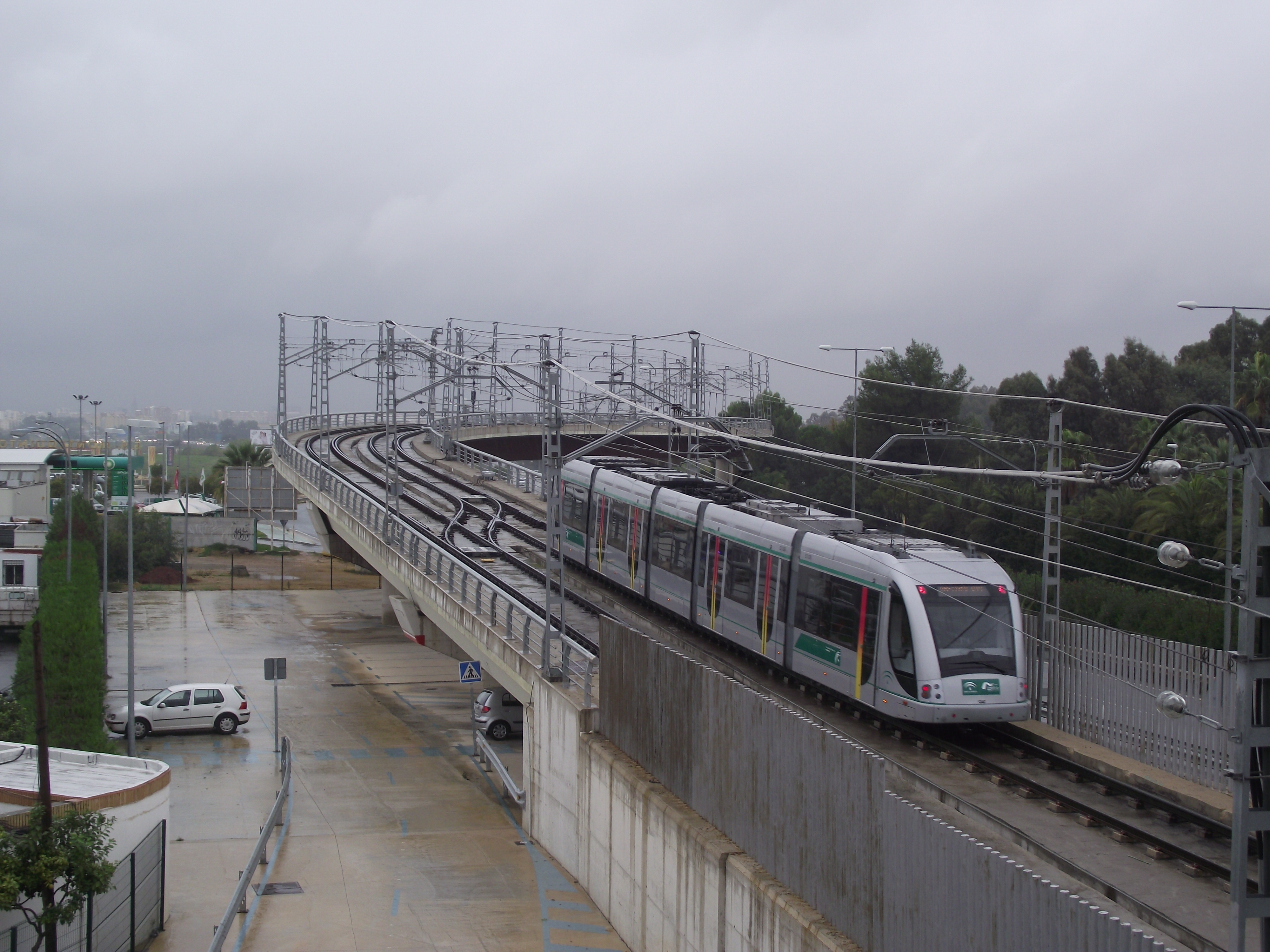 Sevilla metro op viaduct